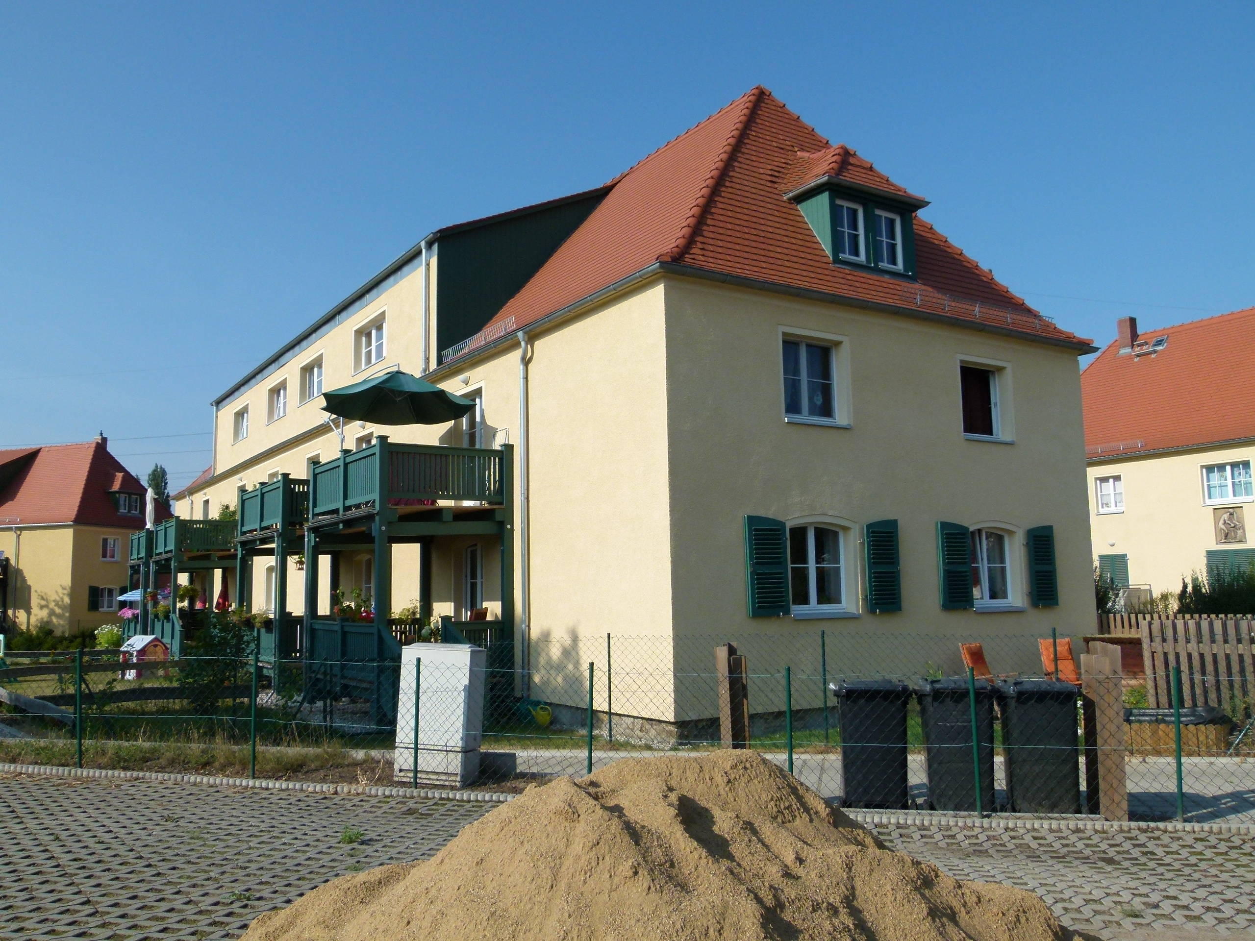 Denkmalgeschütztes Haus, Weistropper Straße 1-3, Radebeul, Sachsen